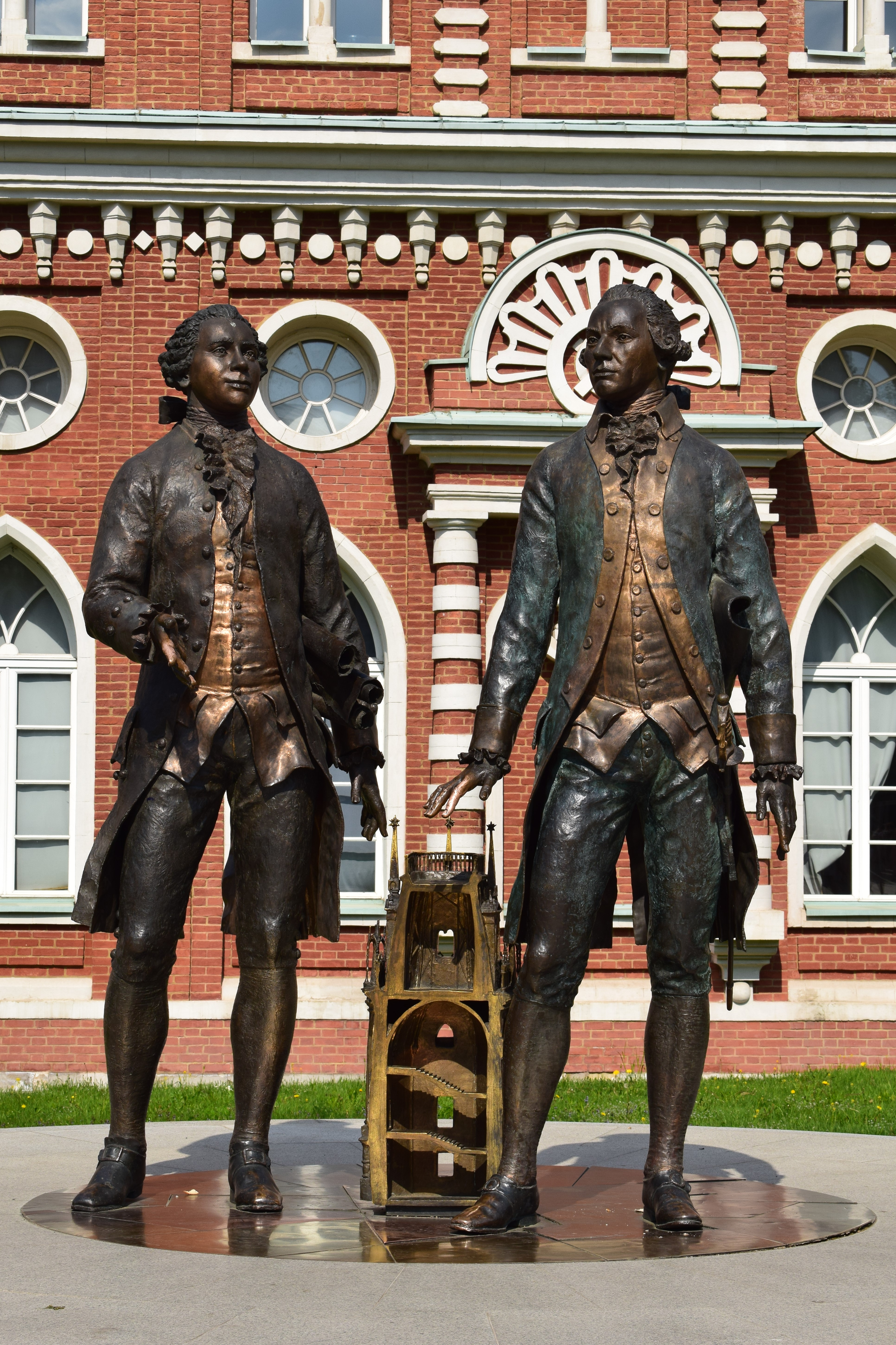 Памятник Баженову и Казакову в Царицыне.